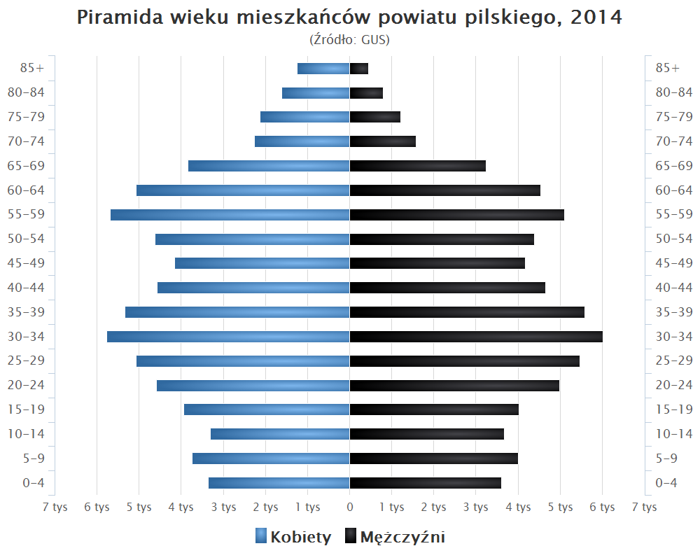 Piramida wieku mieszkańców powiatu pilskiego, 2014